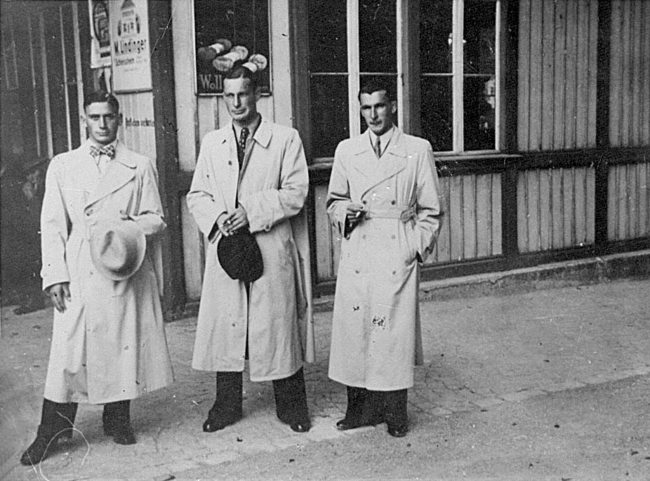 Богдан Илиев, Димитър Списаревски, Матей - Берлин, 1939г.